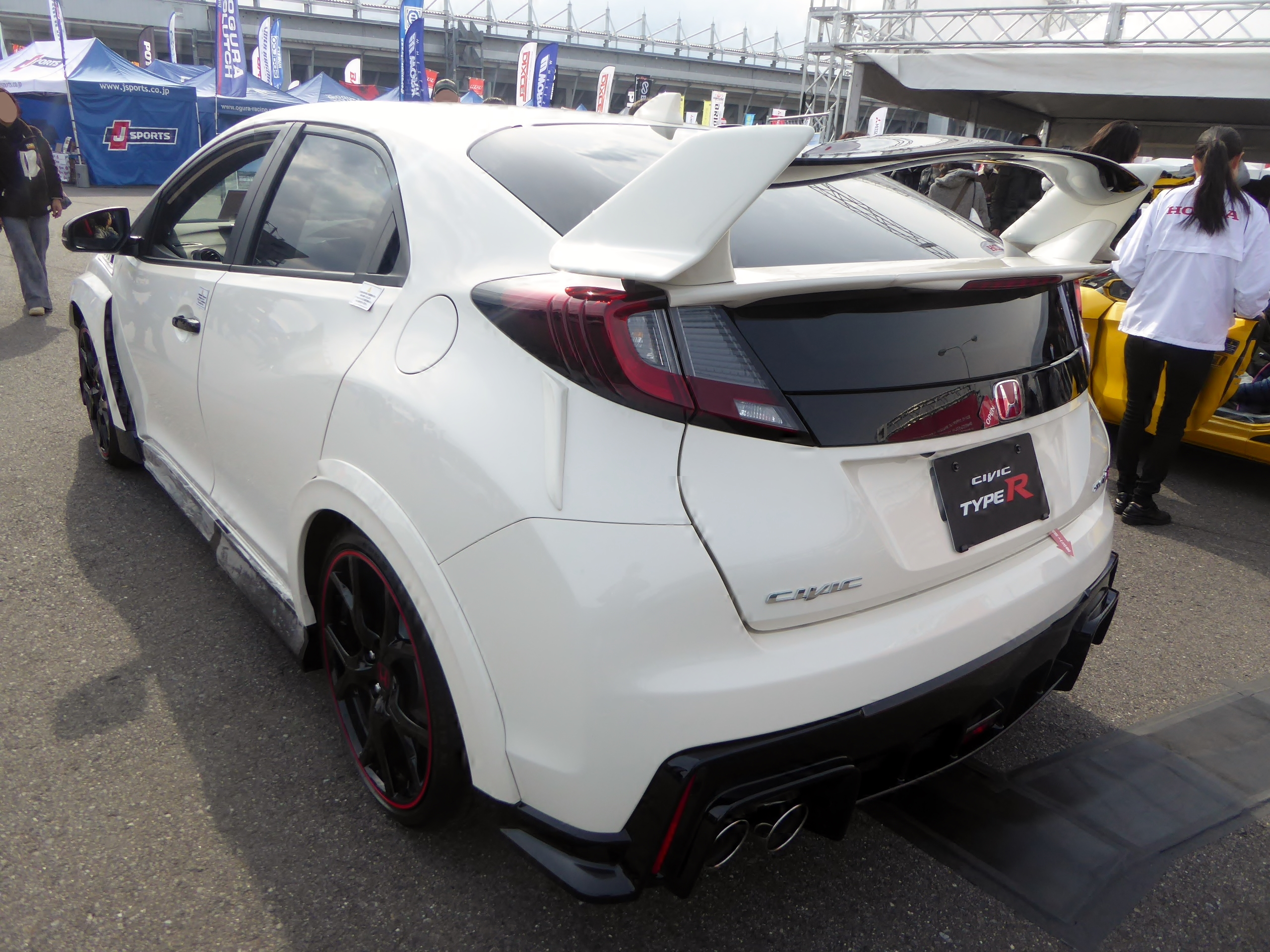 DBA-FK2型ホンダ・シビックタイプRをリアから撮影。